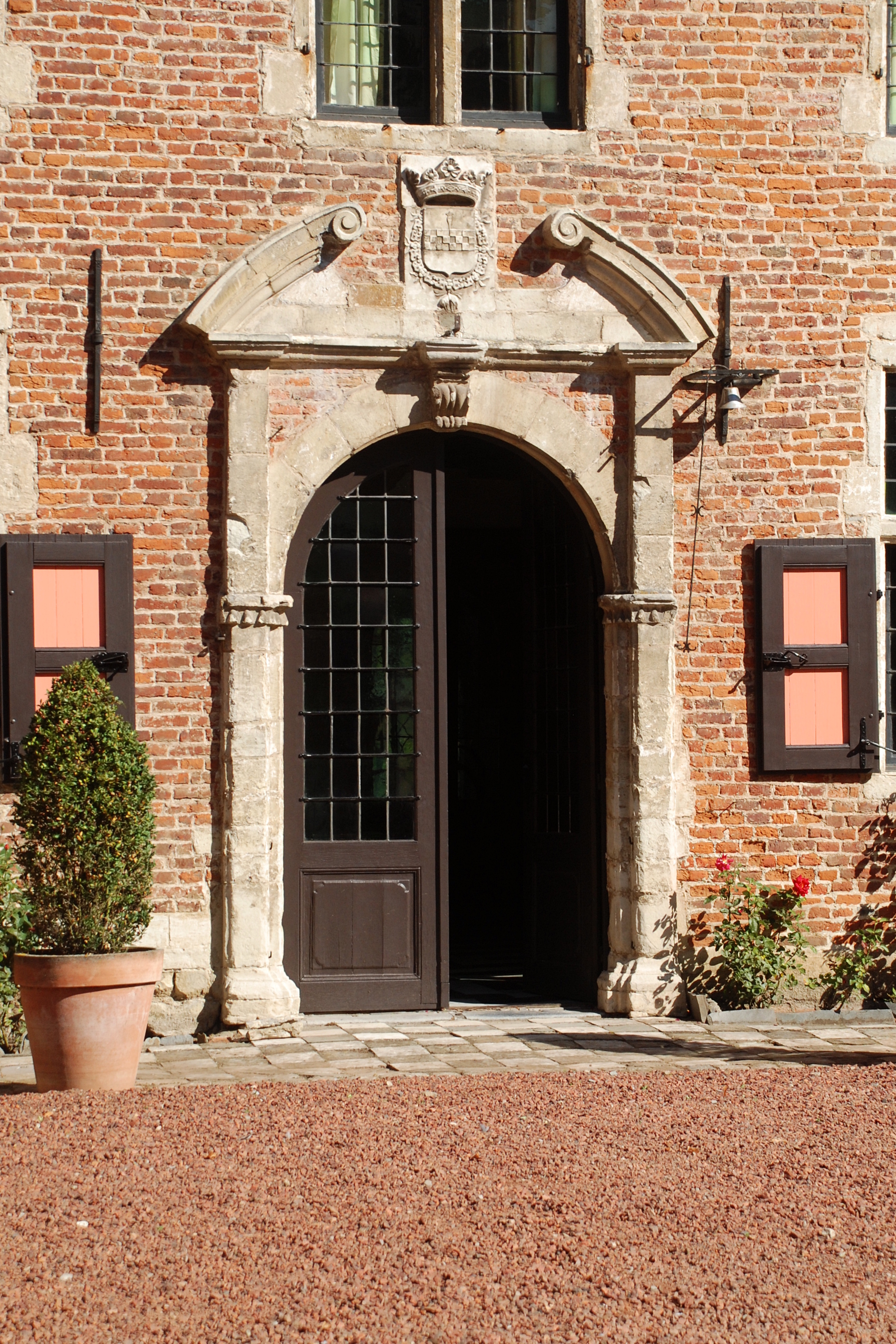 Belgique - Brabant wallon - Château de Rixensart